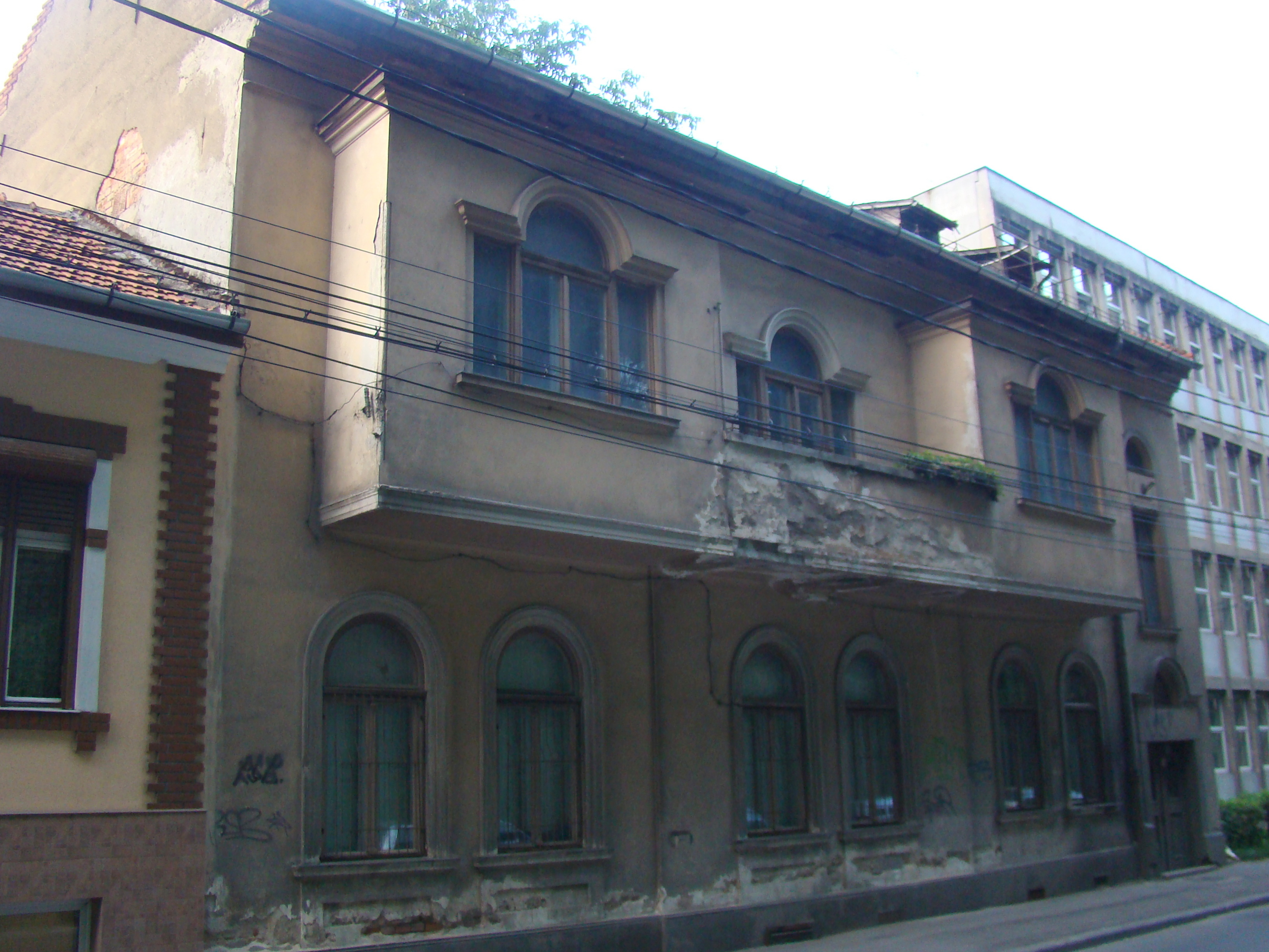 Clădire monument istoric, str.Clinicilor, nr34